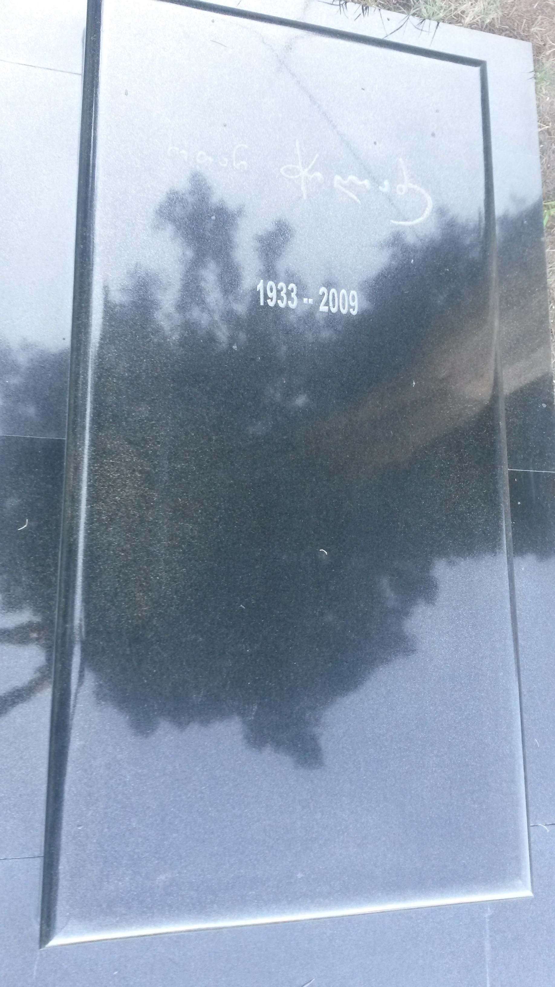 მთაწმინდის პანთეონი